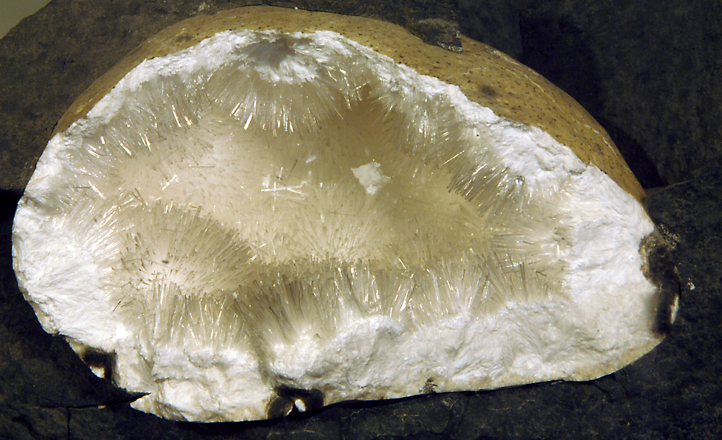 Aus der Mineraliensammlung des Senckenberg-Museums in Frankfurt am Main